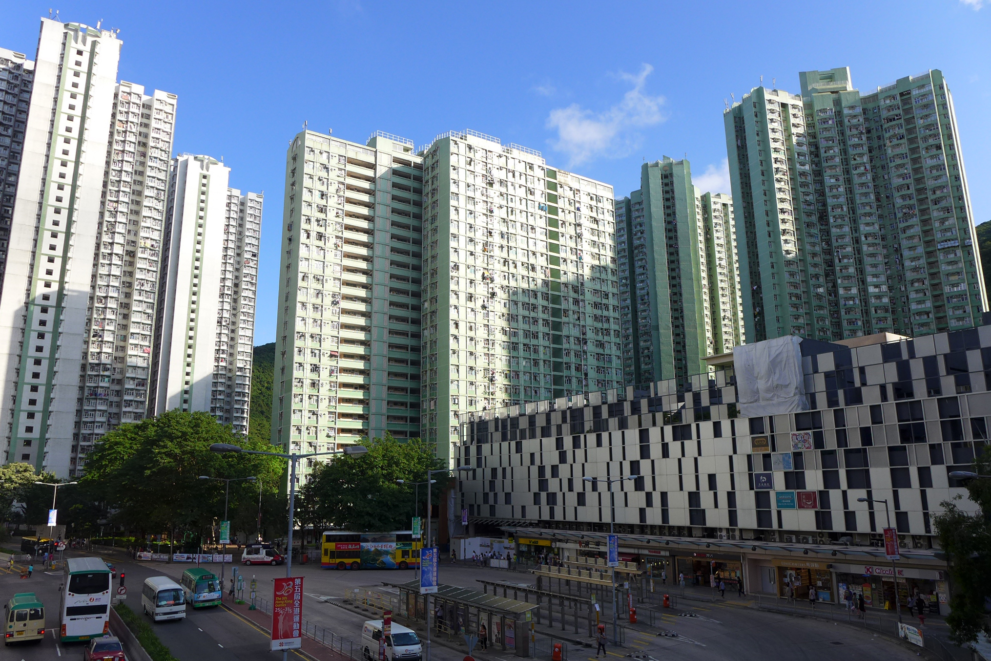 Siu Sai Wan Estate